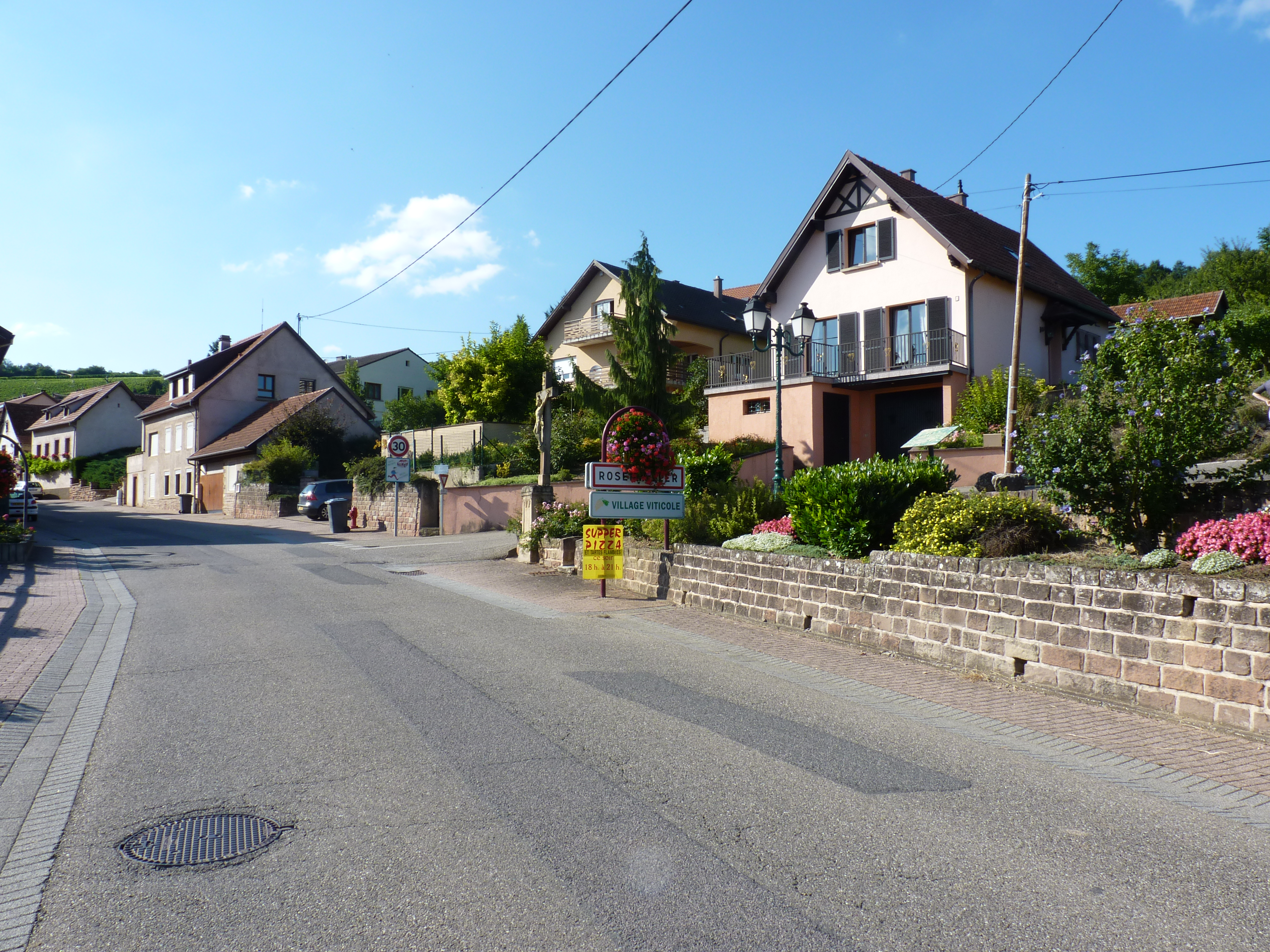 Entrée du village de Rosenwiller